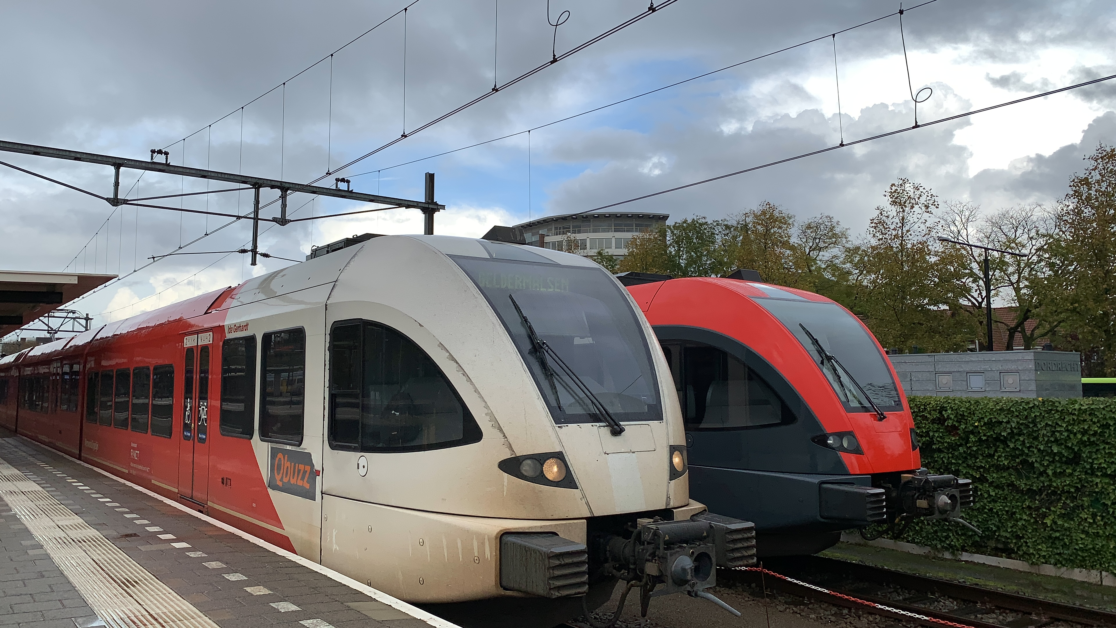 Qbuzz 6355 en 6351 (R-net kleurstelling) op station Dordrecht.